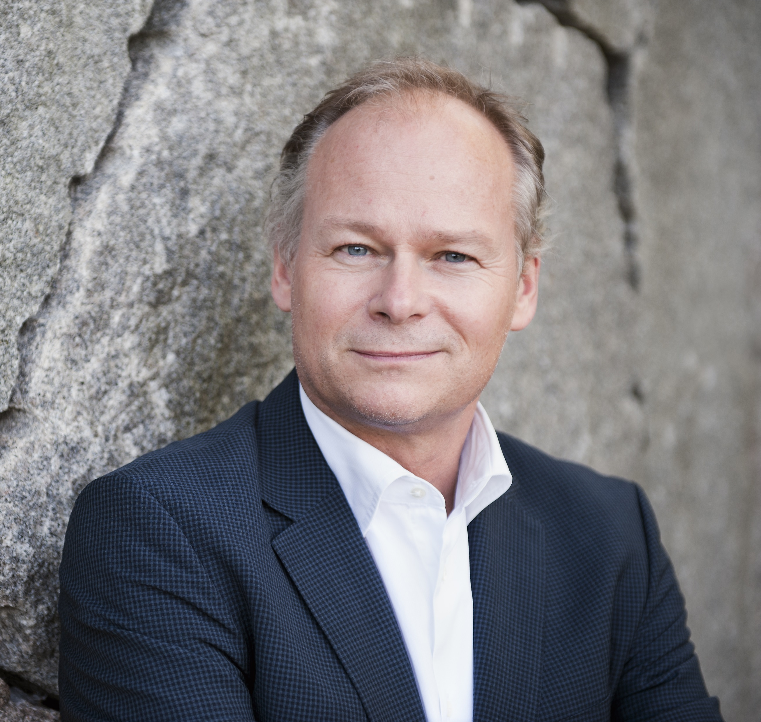 Statsvetaren Tommy Möller, professor vid Stockholms Universitet.